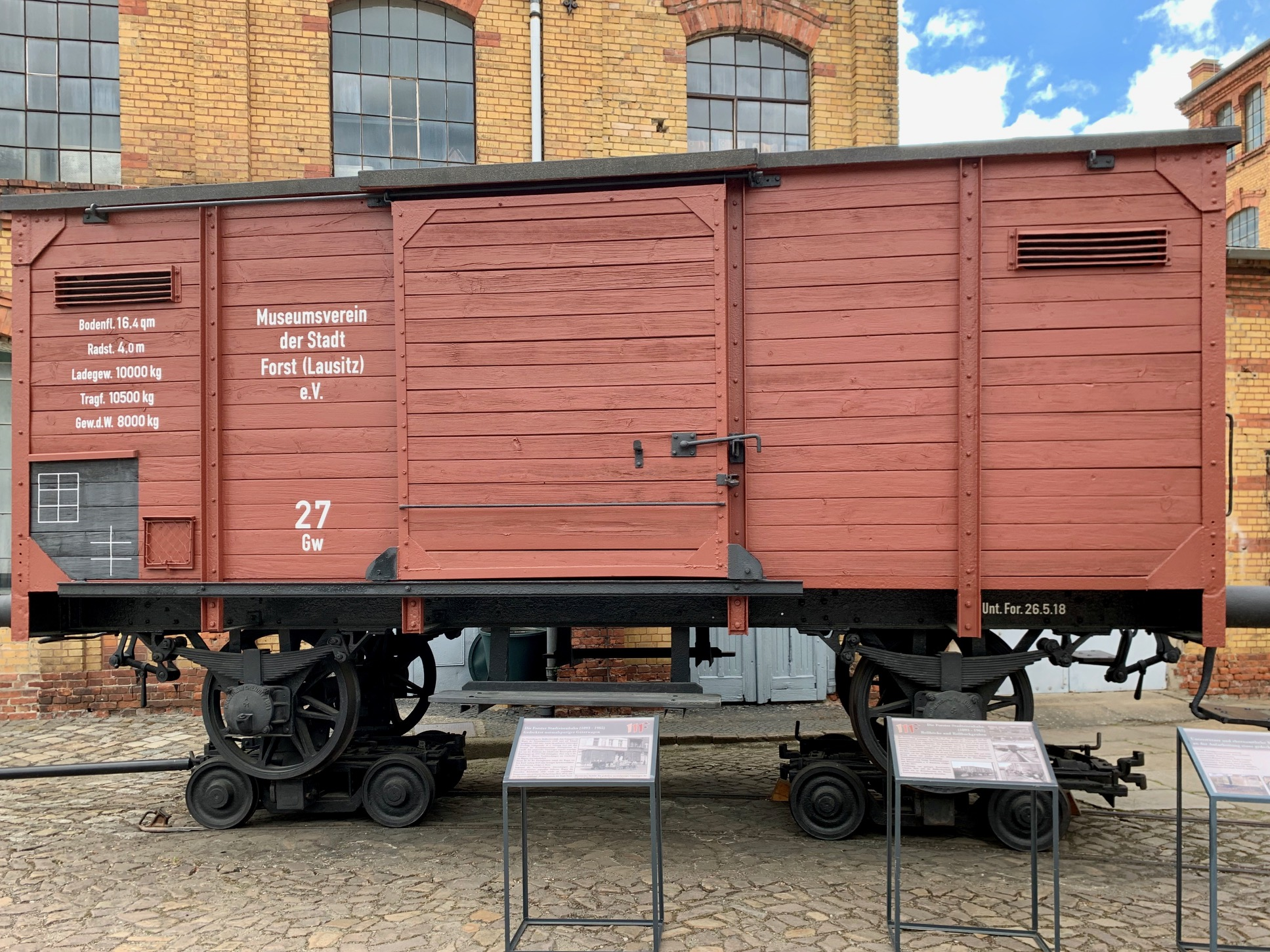 Normalspuriger Güterwagen auf Schmalspurgestellen im Brandenburgischen Textilmuseum Forst (Lausitz)